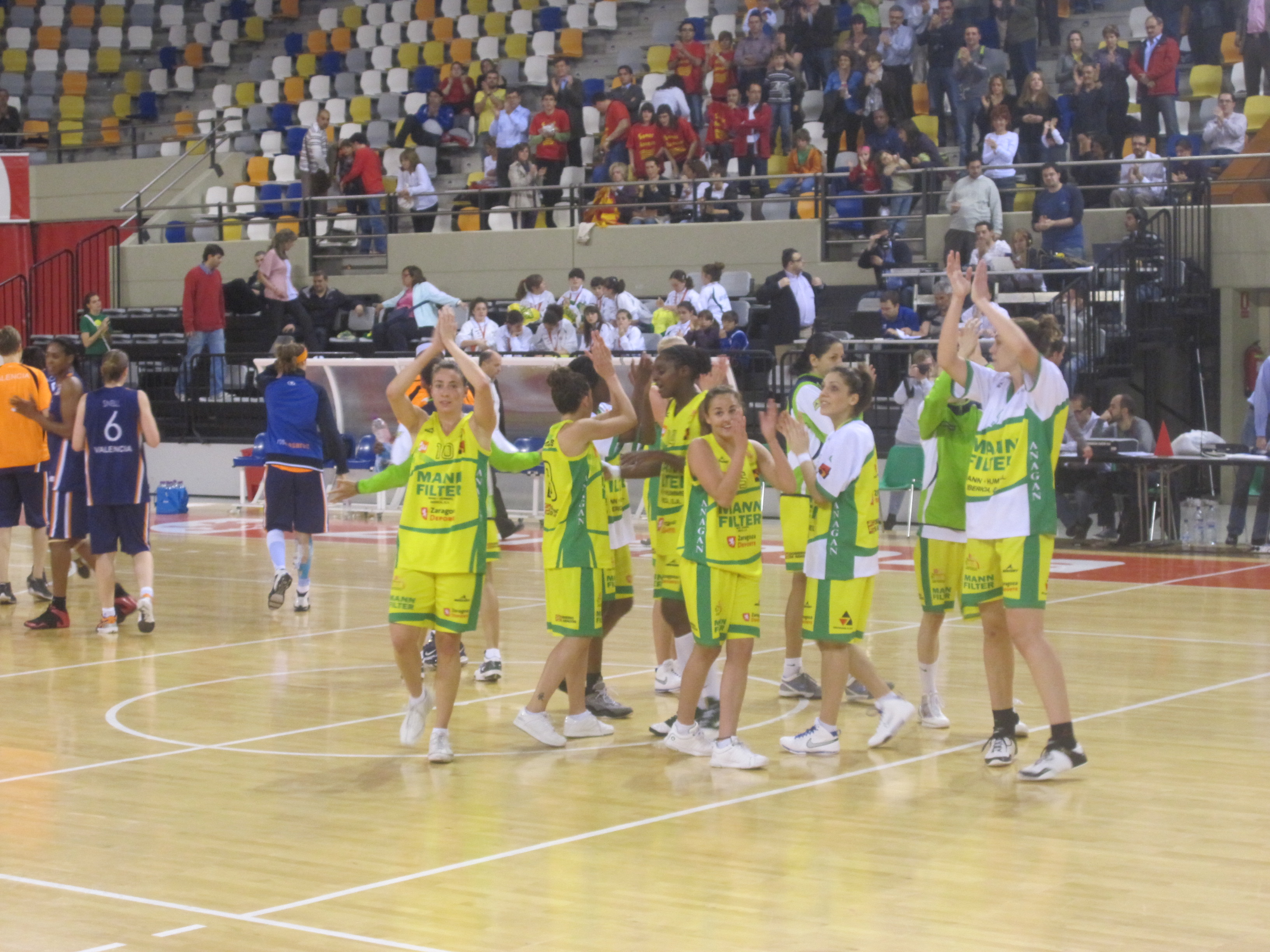 El Equipo Español de baloncesto femenino Mann Filter.